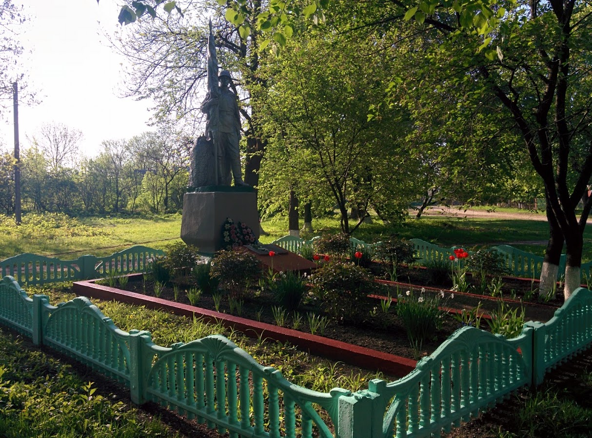 Братська могила загиблих у ході визволення селі від нацистів